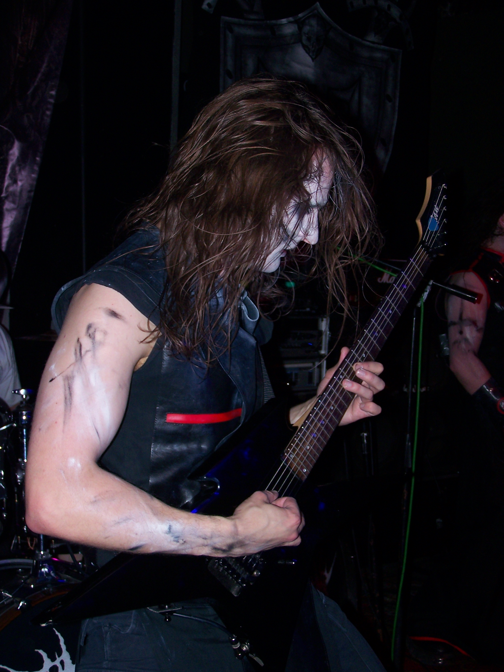 Socaris - gitarzysta zespołu Hermh podczas koncertu w katowickim Mega Clubie.